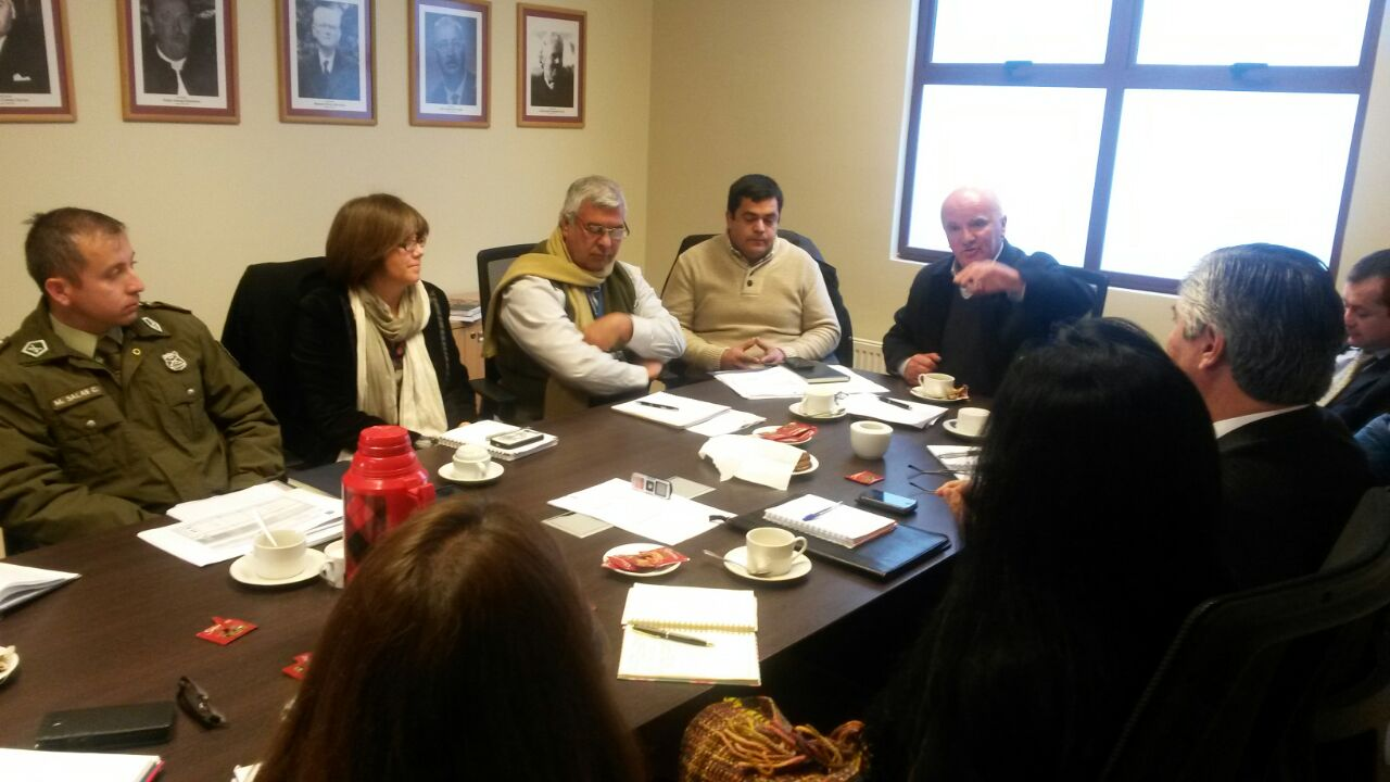 Concejo Municipal de La Estrella se reúne con gobernadora Teresa Núñez, Comisario Marcelo Salas Carvacho, y directora regional de seguridad pública, sobre inseguridad en la comuna.